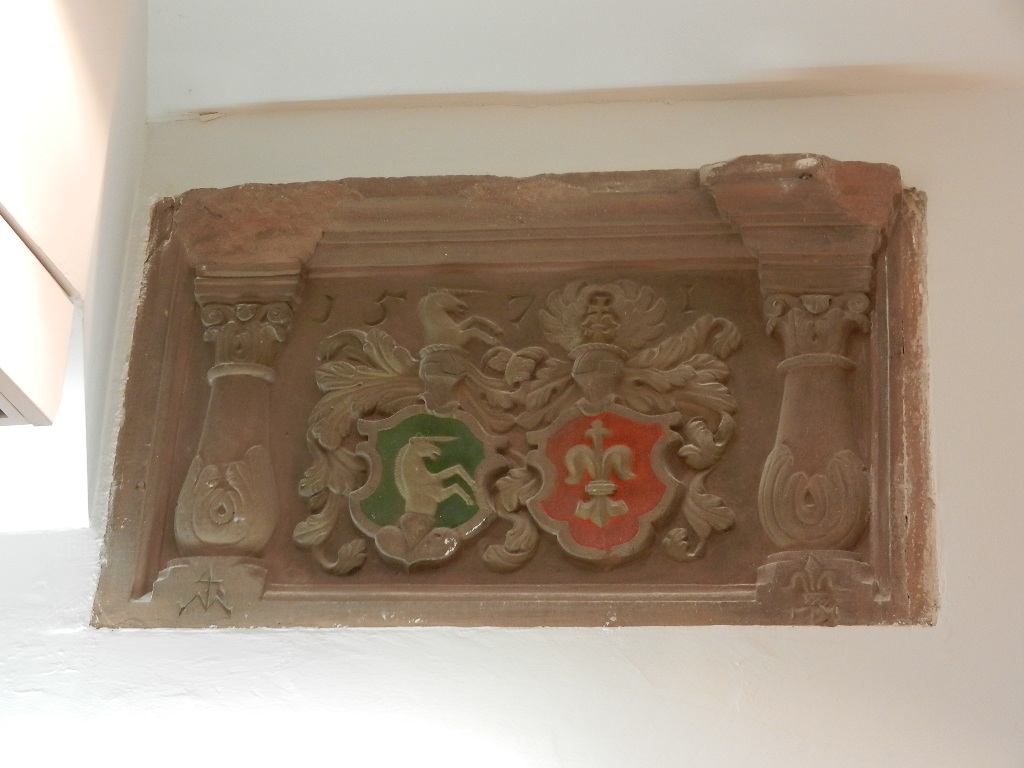 Wappen 1571 mit Einhorn und Liliendarstellung im Erdgeschoß Maximilianstraße 14